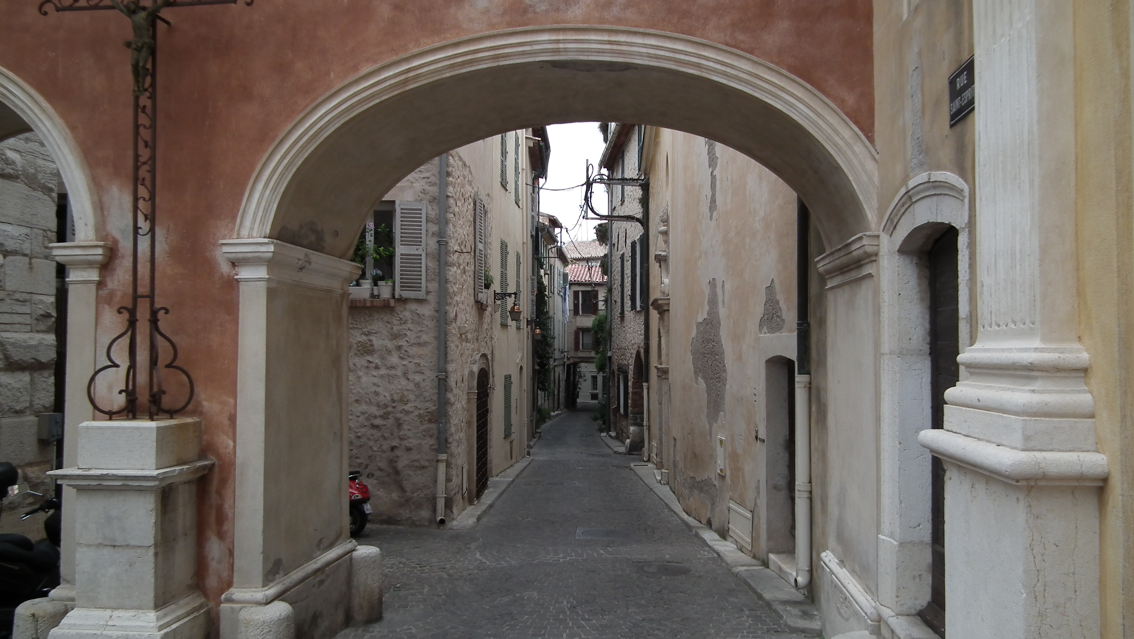 переулки Антиба